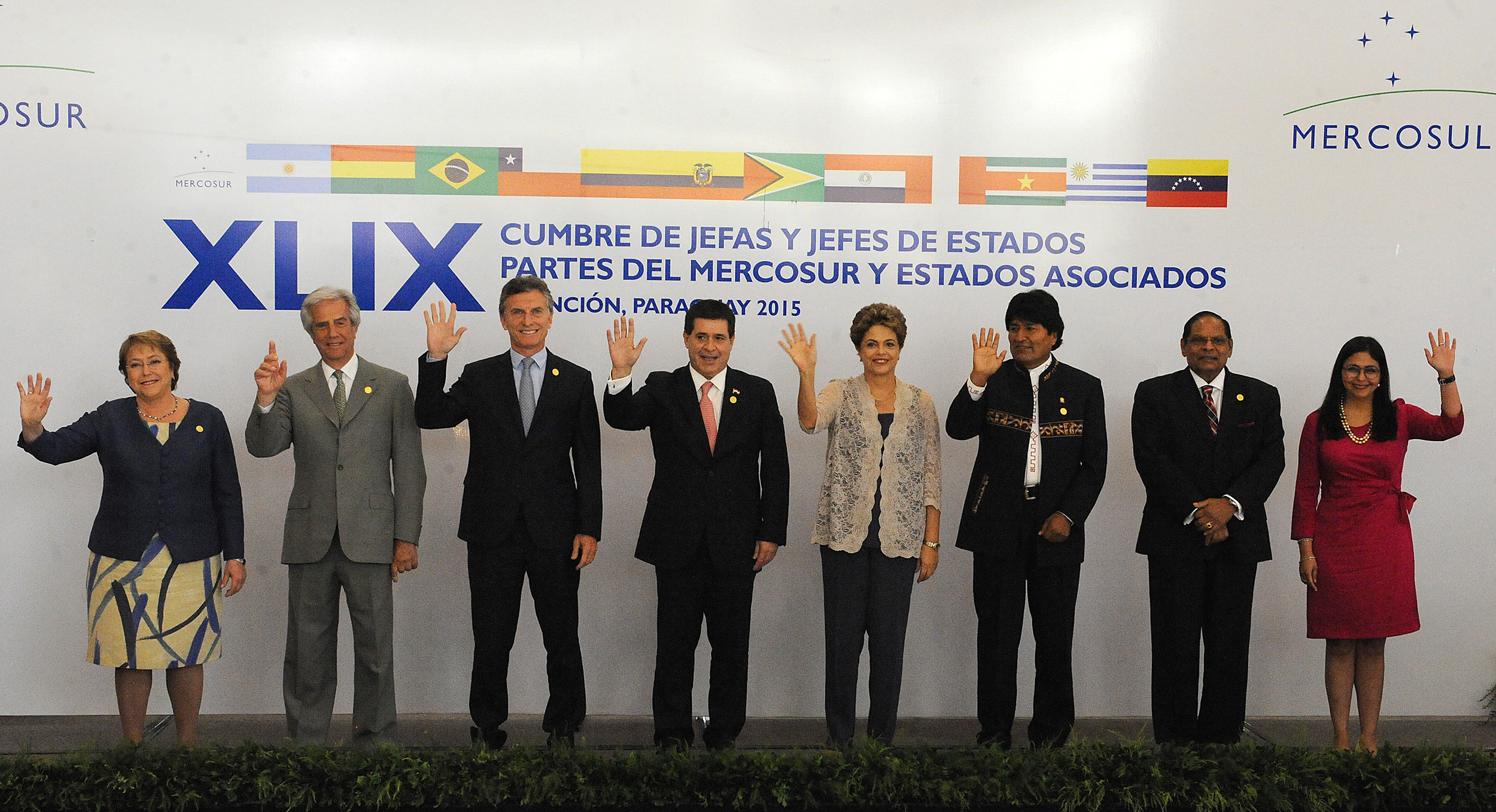 Foto oficial de la 49ª Cumbre del Mercosur en Asunción, Paraguay, 21 de diciembre de 2015.